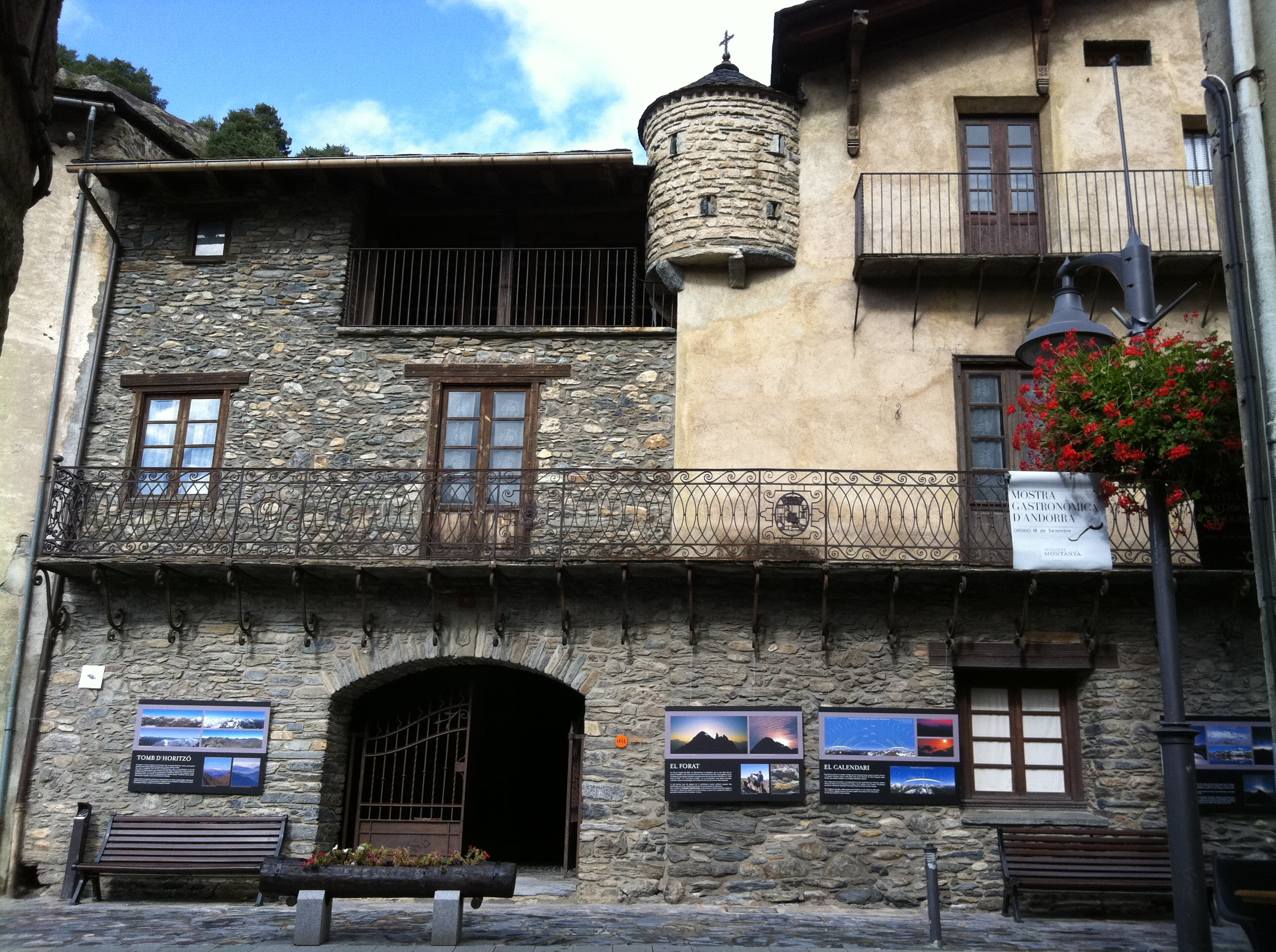 Casa Museu Areny Plandolit